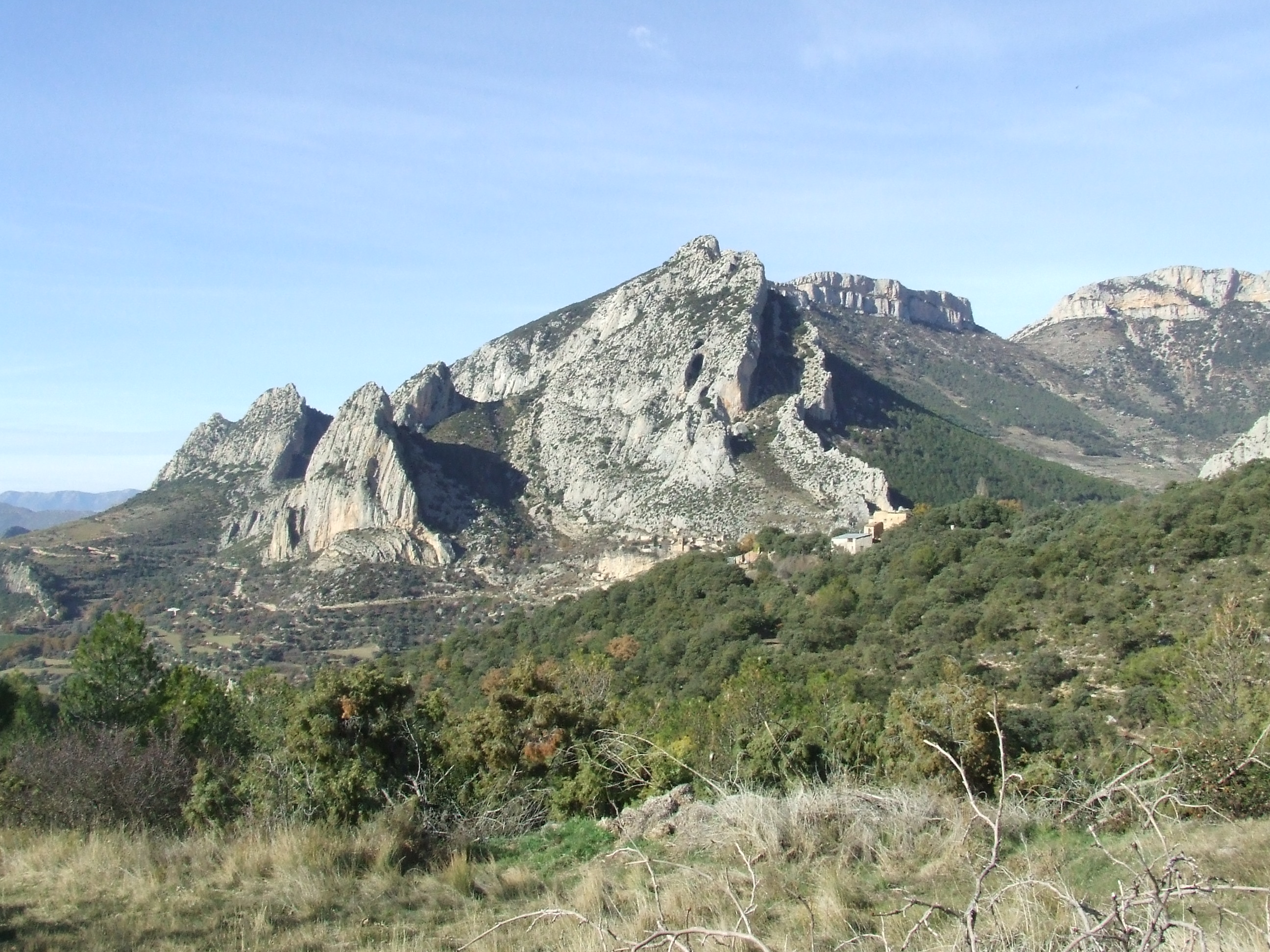 La Serra de Monteguida (Abella de la Conca, Pallars Jussà)